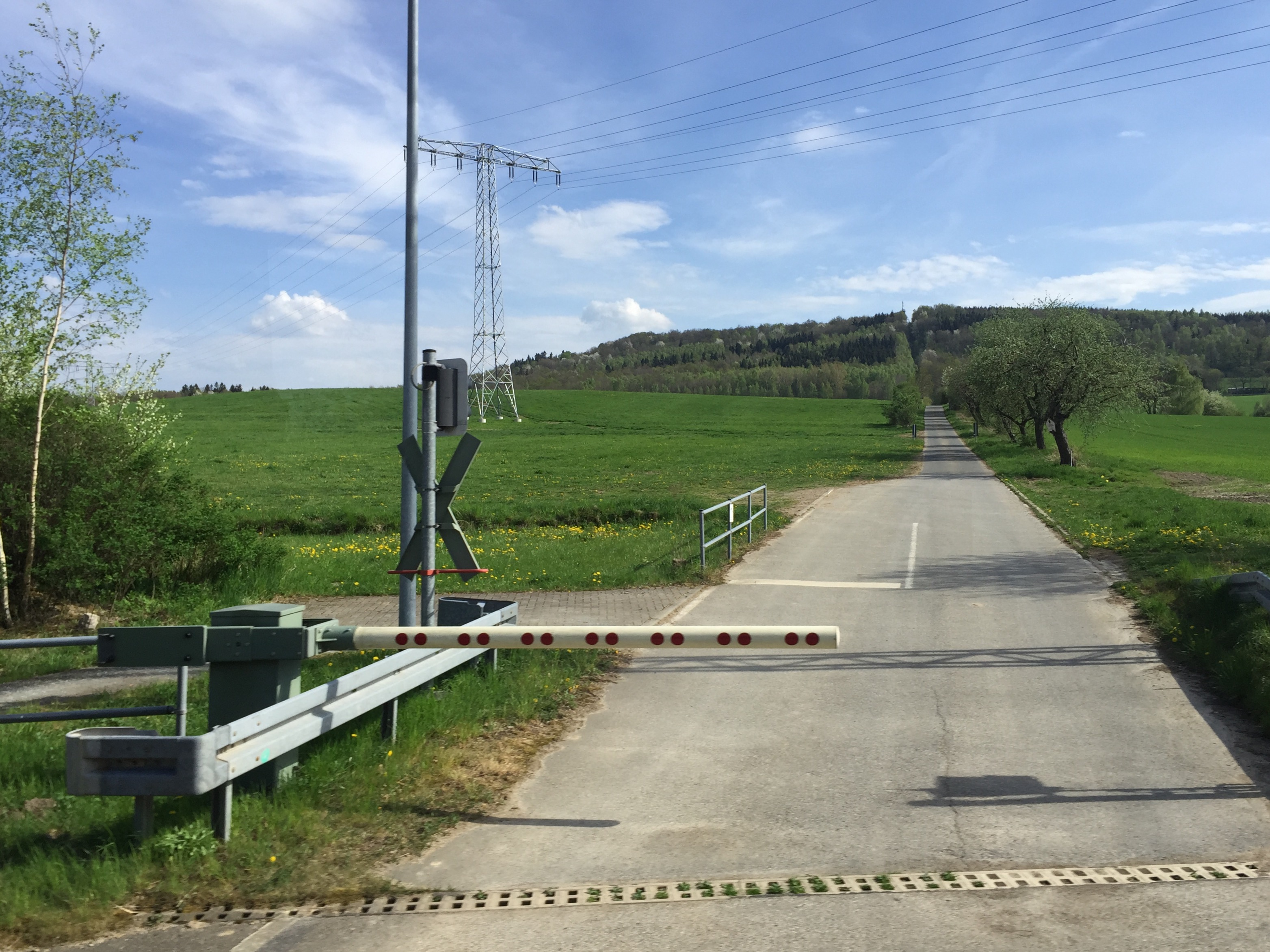 Zoblitz Bahnübergang